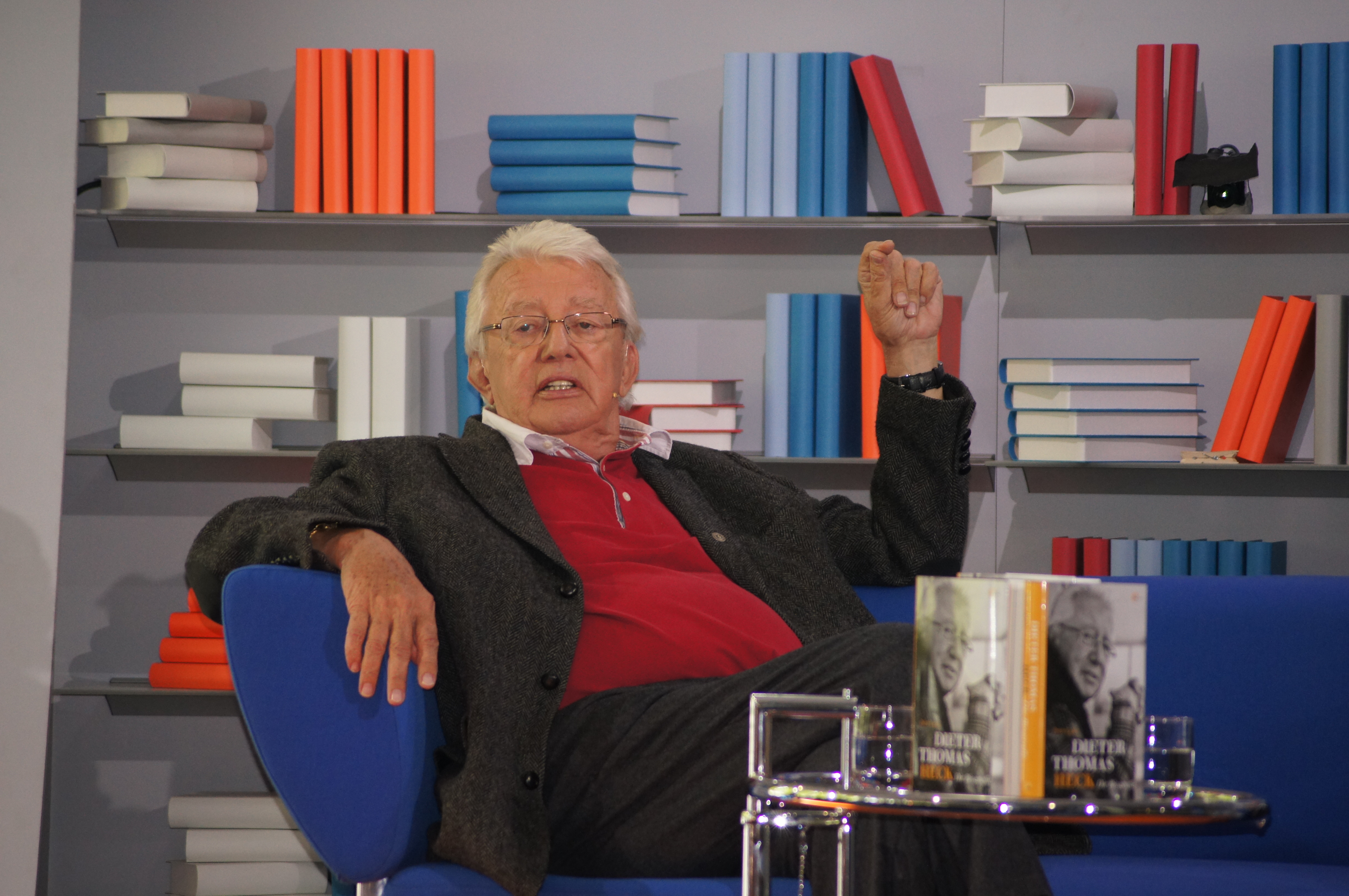 Dieses Fotos dürfen Sie honorarfrei nutzen, wenn Sie folgenden credit beachten: Copyright: Das blaue Sofa / Club Bertelsmann. Dieter Thomas Heck (eigentlich Carl-Dieter Heckscher), 1937 in Flensburg, ist Schlagersänger, Moderator, Produzent und Entertainer.